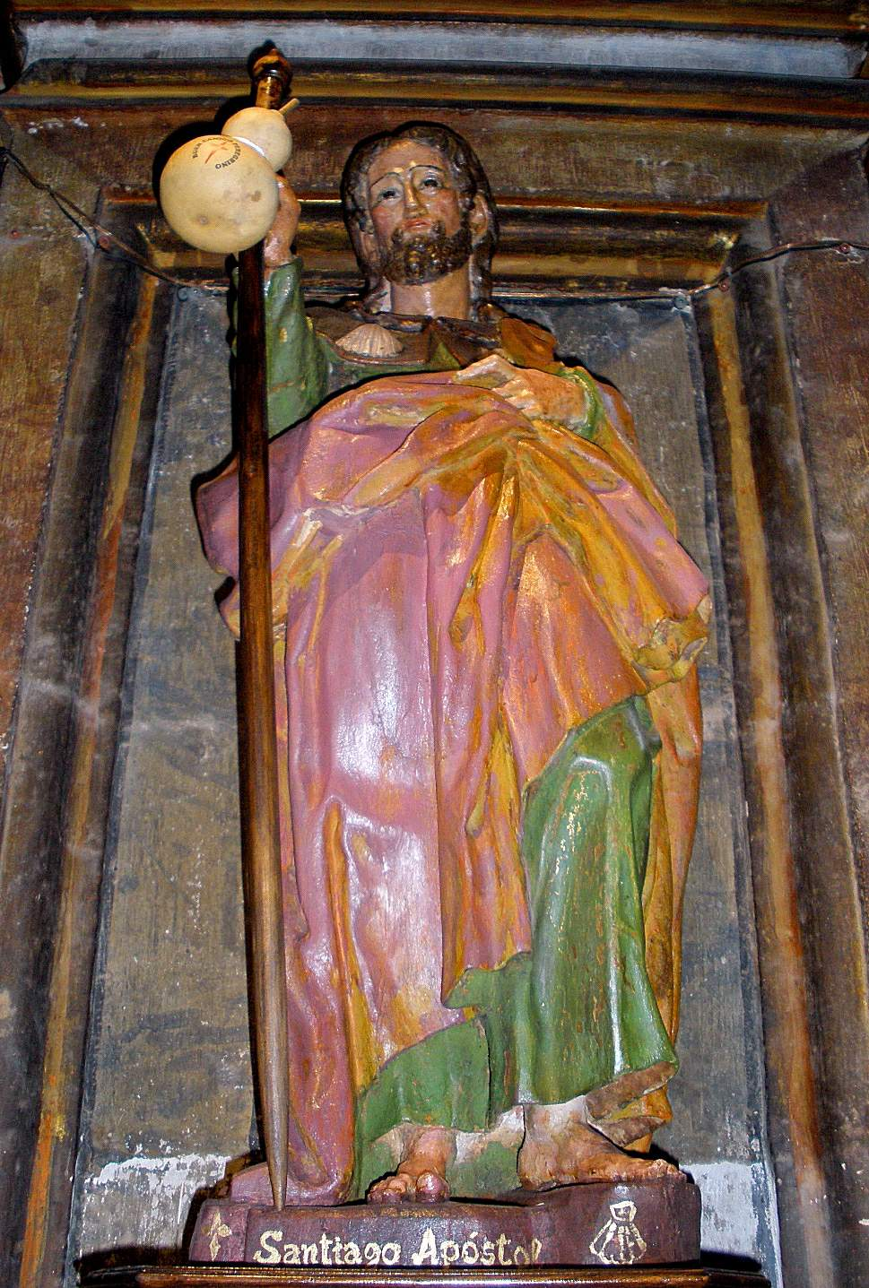 Talla de Santiago Apóstol en la iglesia de Santa María de Los Arcos, Navarra